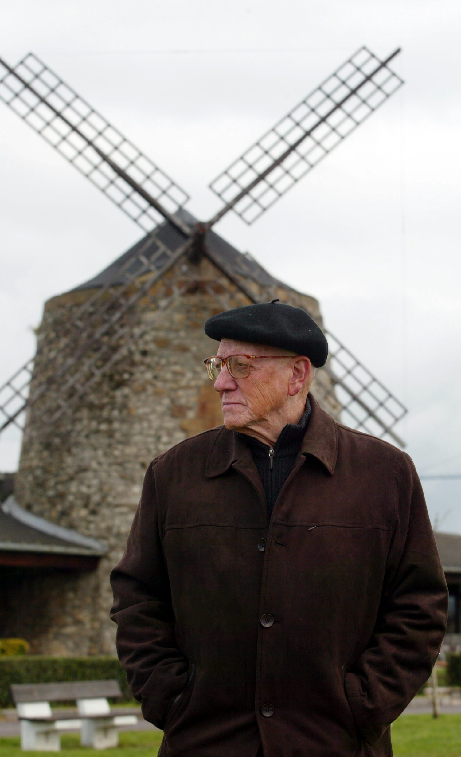 El escritor Ramiro Pinilla en Getxo en 2005.